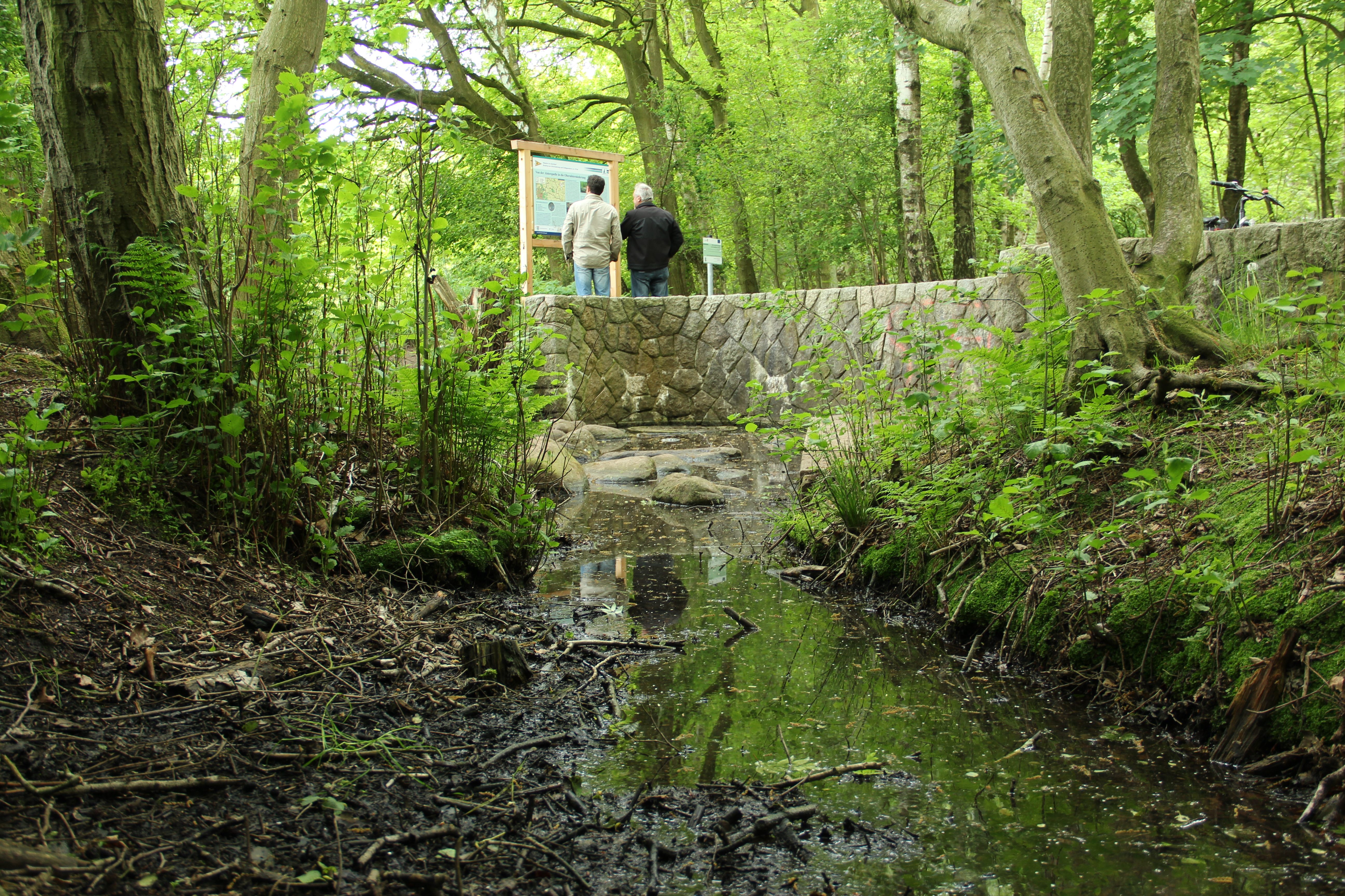 Auf dem Bild ist die im Naturschutzgebiet „Oberalsterniederung“ liegende Quelle der Alster in Henstedt-Ulzburg zu sehen; im Hintergrund betrachten zwei Personen eine Infotafel.